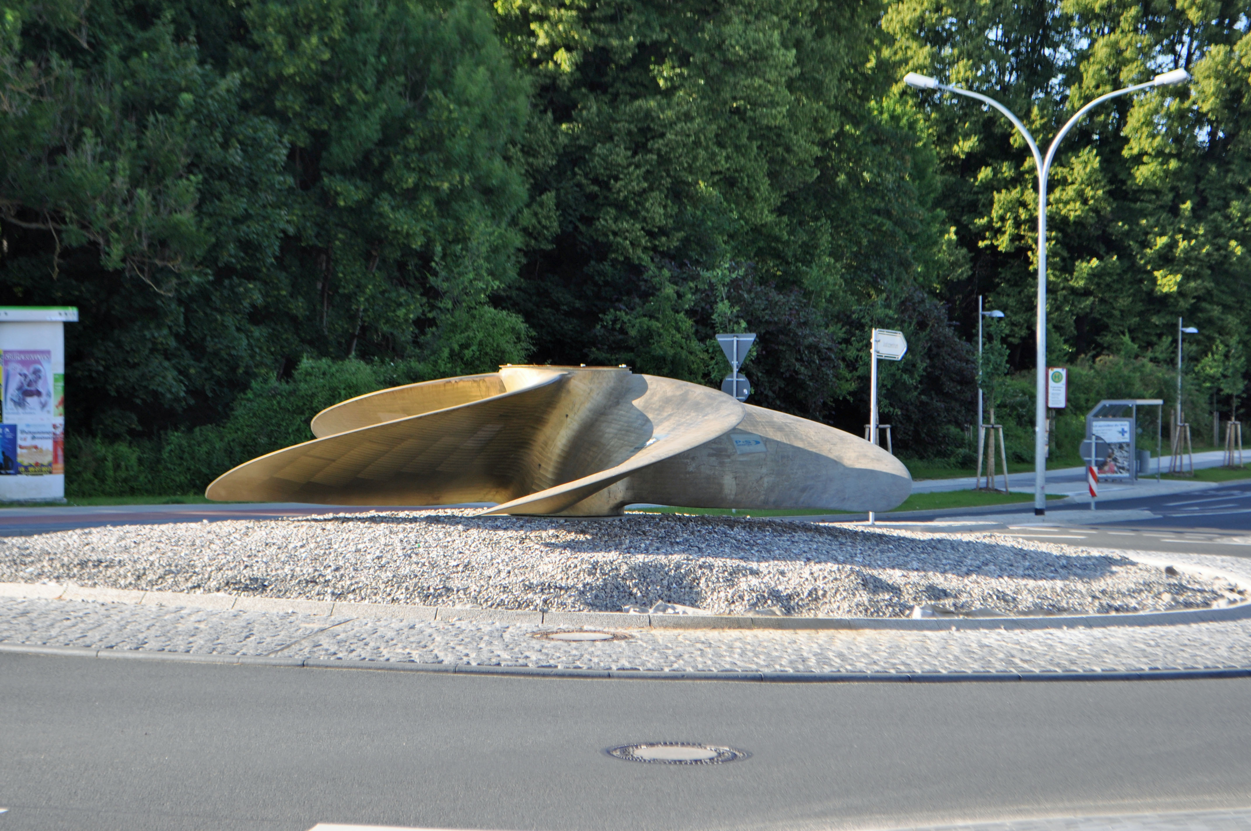 Stralsund, Schiffspropeller in der Mitte eines Kreisverkehrs (Greifswalder Chaussee / Werftstraße / Frankendamm / Karl-Marcx-Straße).